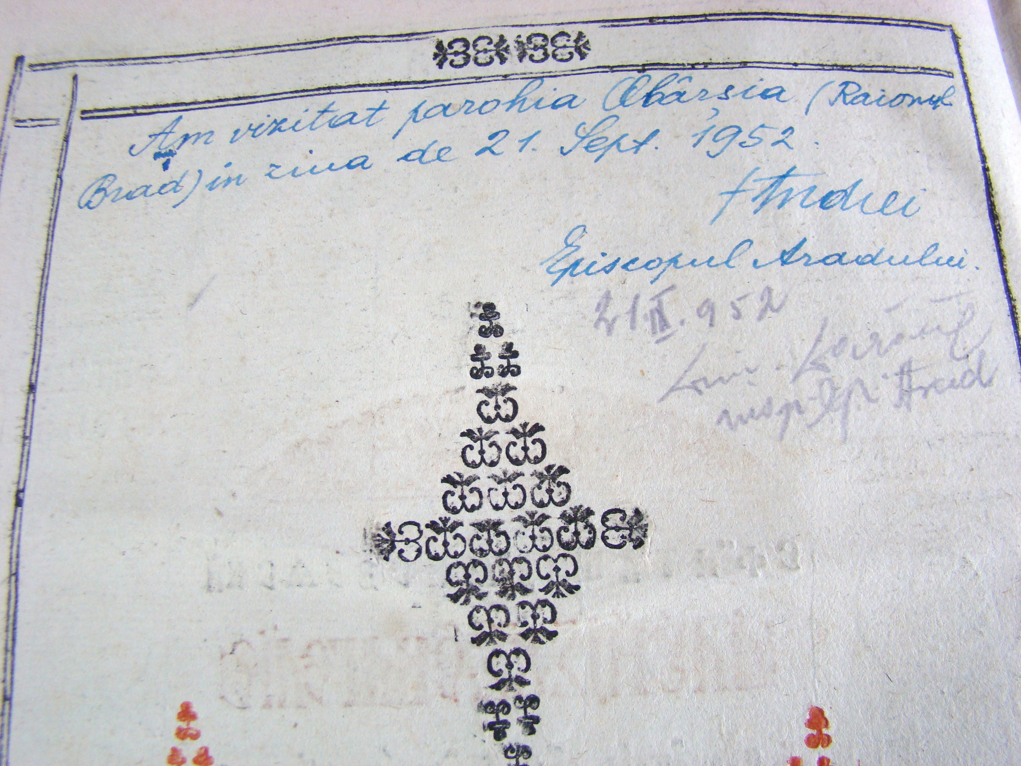 Carte din patrimoniul bisericii-monument din Obârșa, Hunedoara